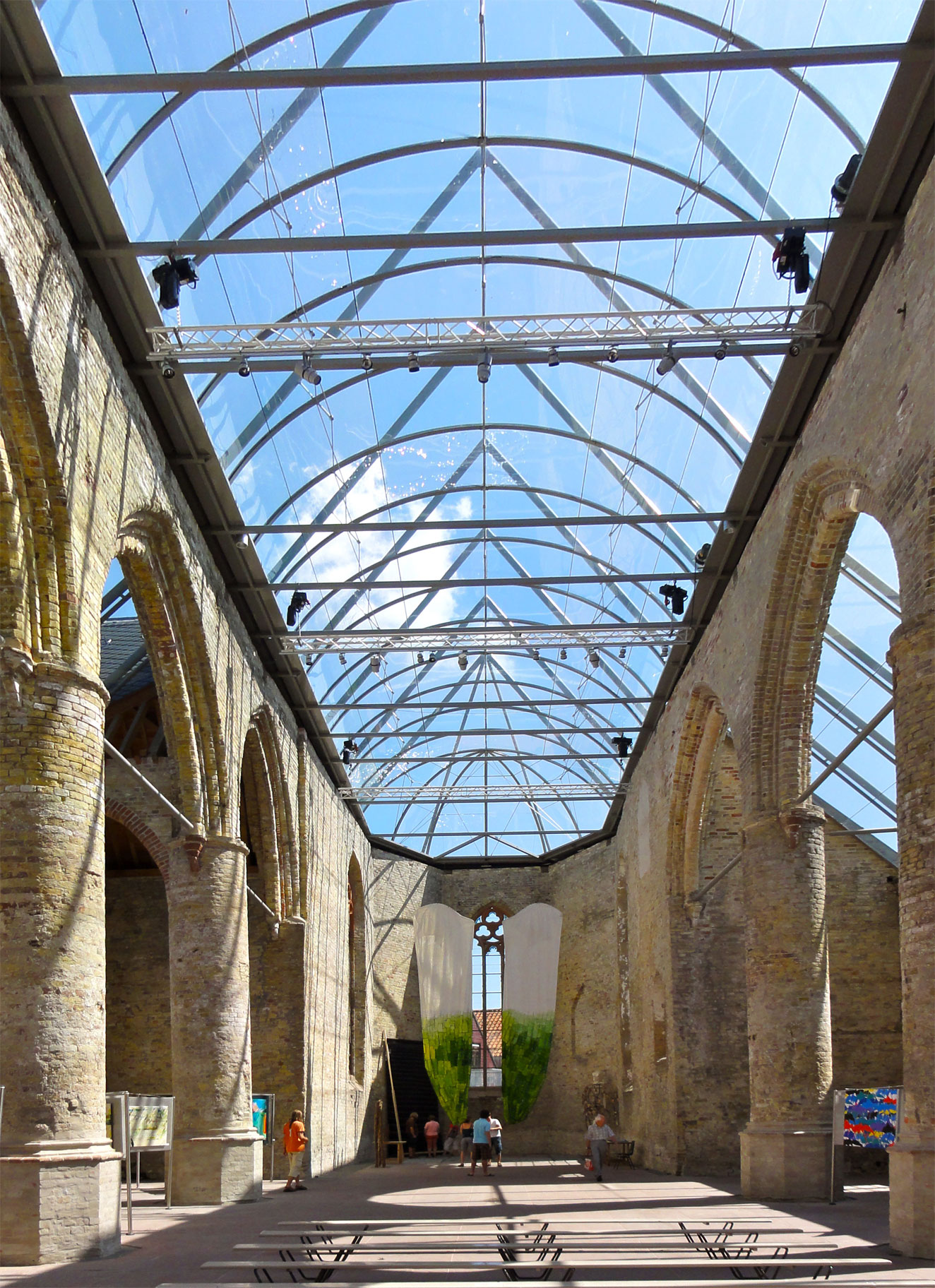 Broerekerk in Bolsward